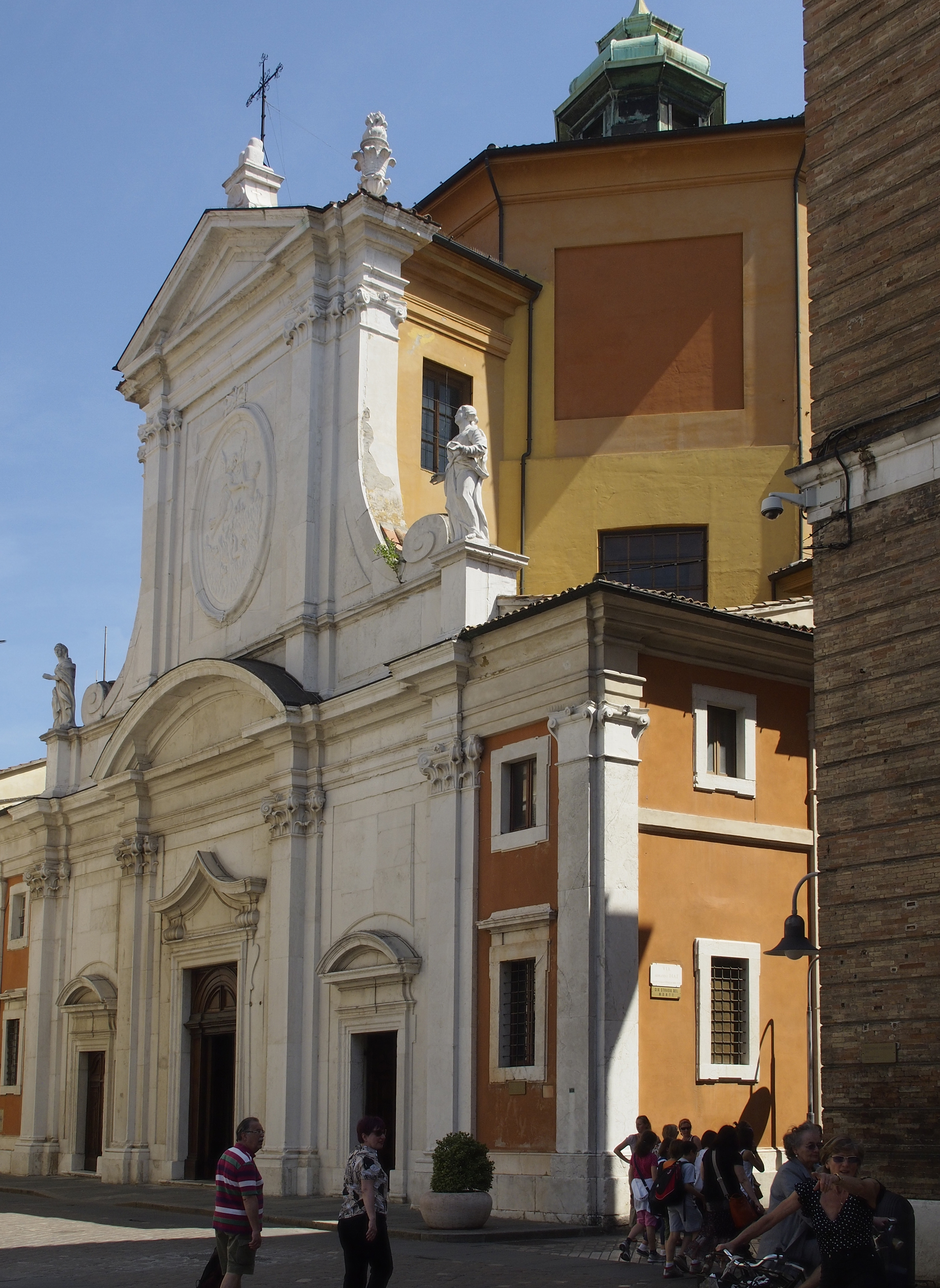 Kirche Santa Maria del Suffragio (Fürbitte) in Ravenna (1728 eingeweit)